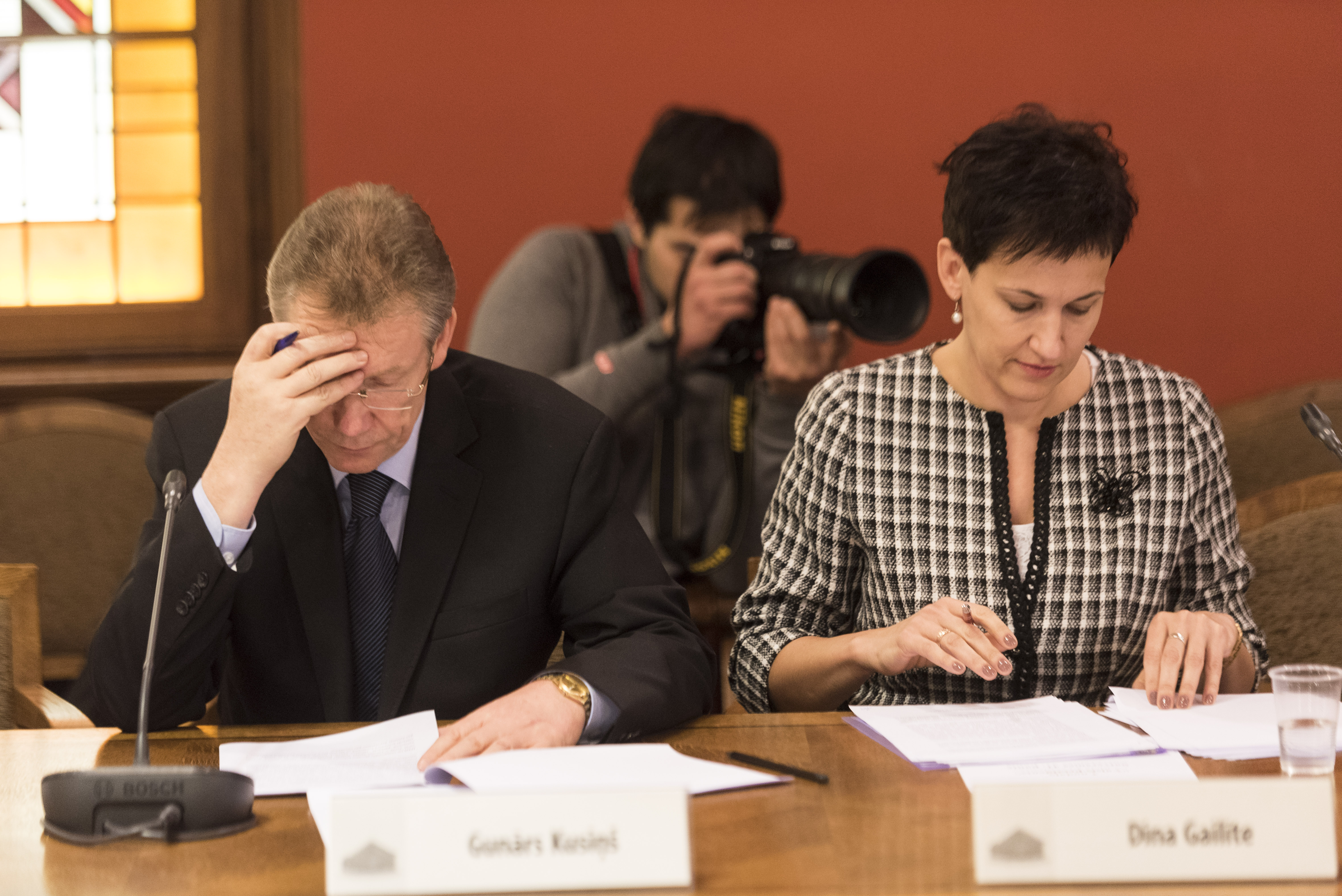 Darba grupas sēde 2015.gada 15.decembrī, Foto: Reinis Inkēns, Saeimas Administrācija